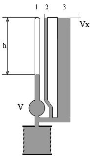 MakLeod's Manometer scheme